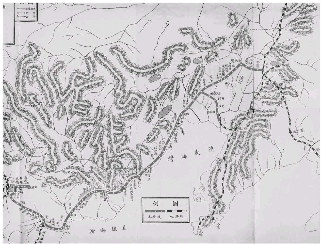 中文（中国大陆）: 京奉铁路全图和沿线地形